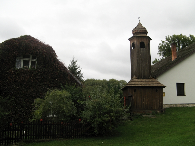 Zvonice, mezi čp. 10 a 11, Rodvínov.